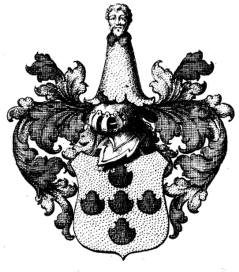 Praenobilis Familia ex Brabantia